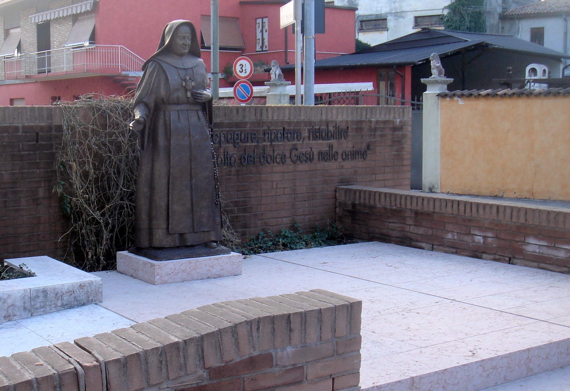 Statua di Maria Pia Mastena (1881-1951) a San Fior. Fu fondatrice a San Fior della Congregazione religiosa delle suore del Santo Volto, è stata beatificata il 13 novembre 2005 sotto Benedetto XVI.